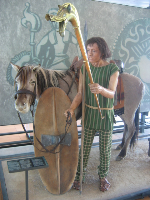 Mannequin représentant un aide de camp du chef éduen Dumnorix. Musée de la civlisation celtique, Bibracte, France.